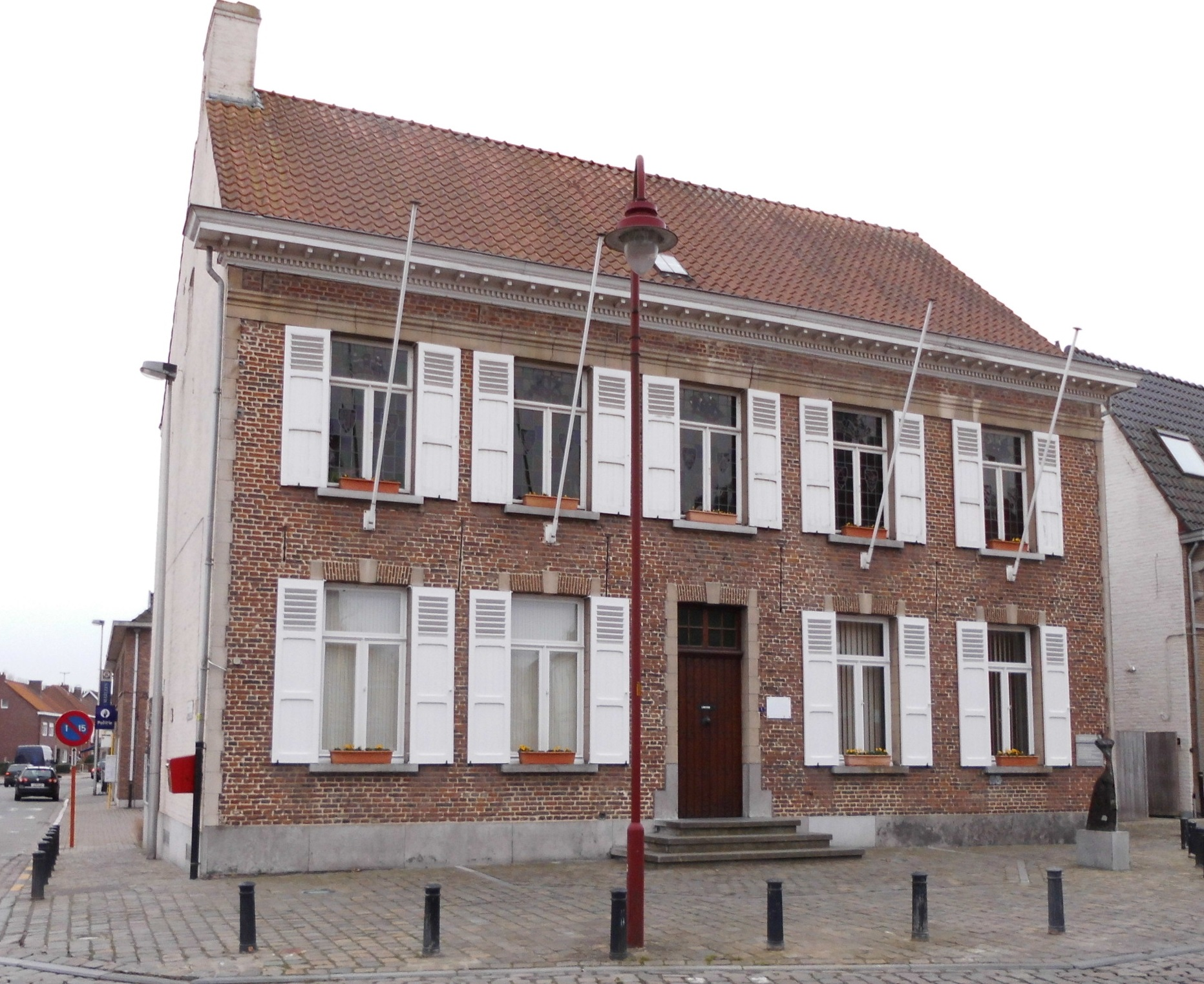 Voormalig gemeentehuis van Zwijnaarde - Dorpsstraat - Zwijnaarde - Gent - Oost-Vlaanderen - België